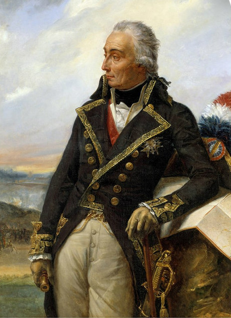 Commandé par Louis-Philippe pour le musée historique de Versailles en 1834